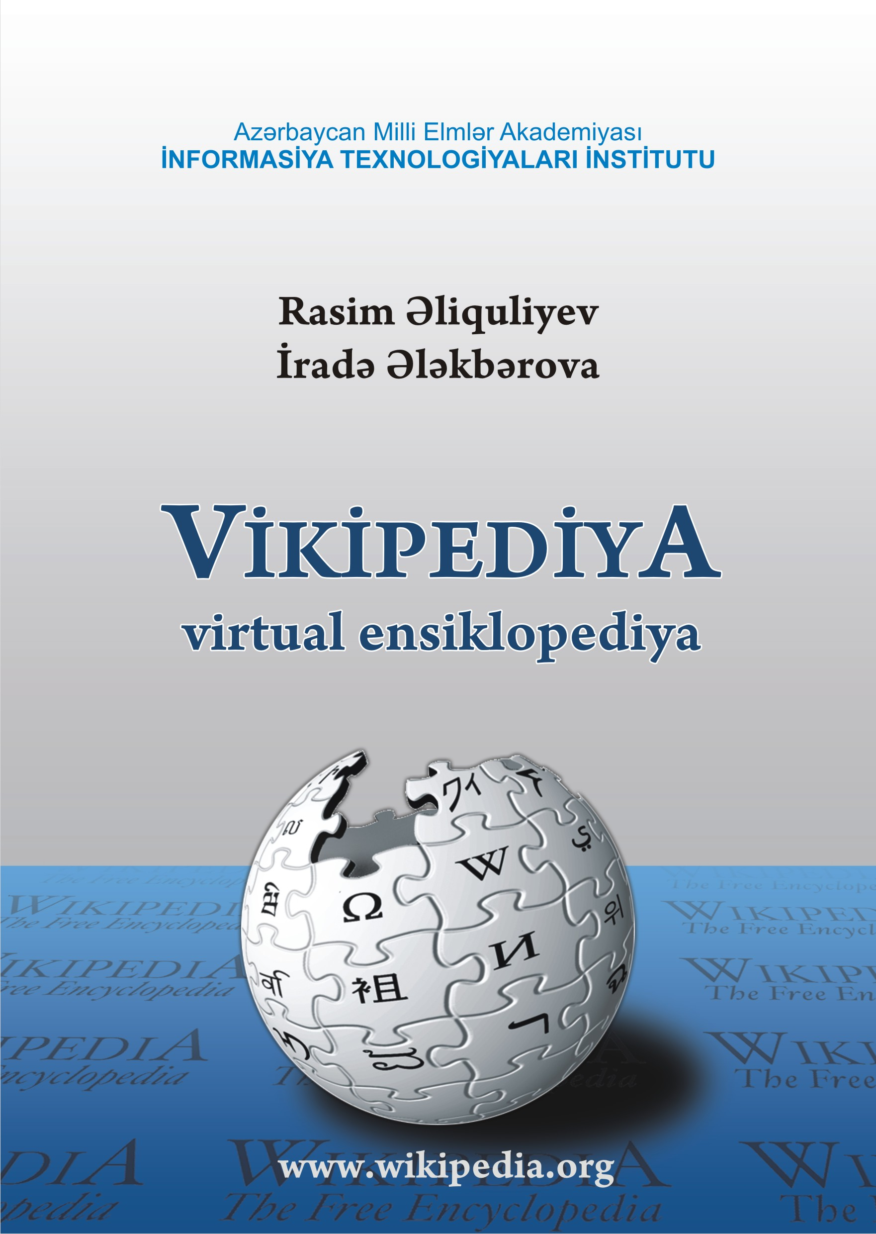 "Vikipediya. Virtual ensiklopediya" kitabının üz qabığı.